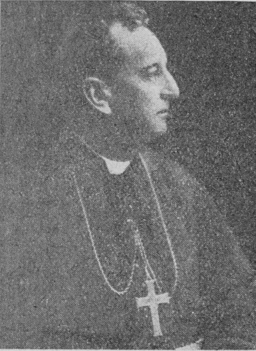 porttrait de Mgr Hurtault.